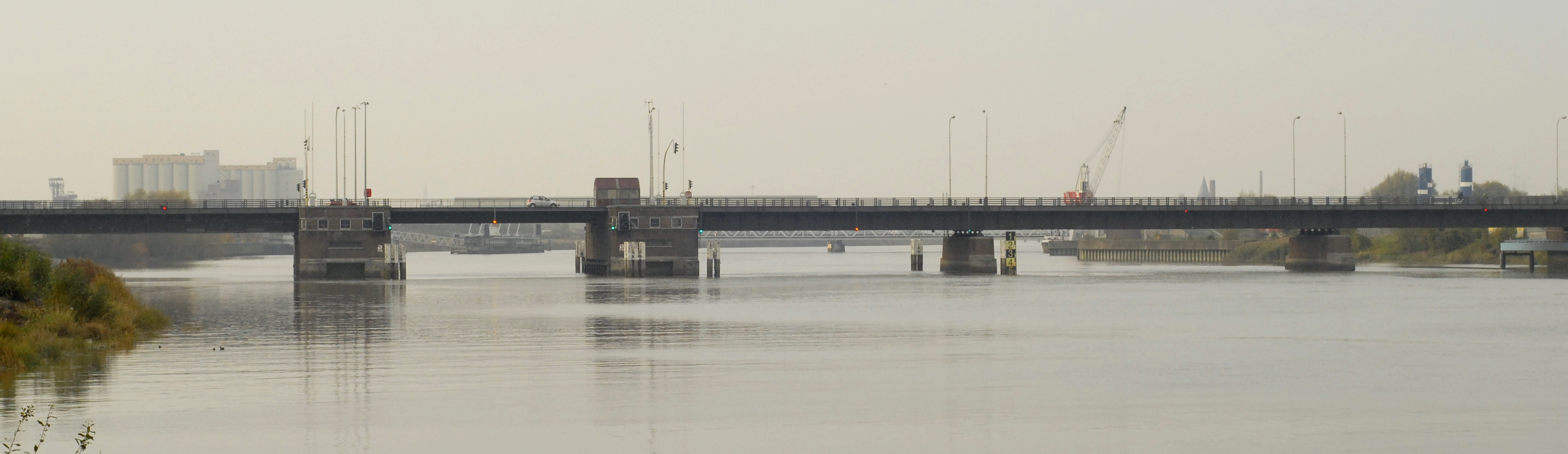 Rupelbrug over de Rupel in Boom (heel de brug)